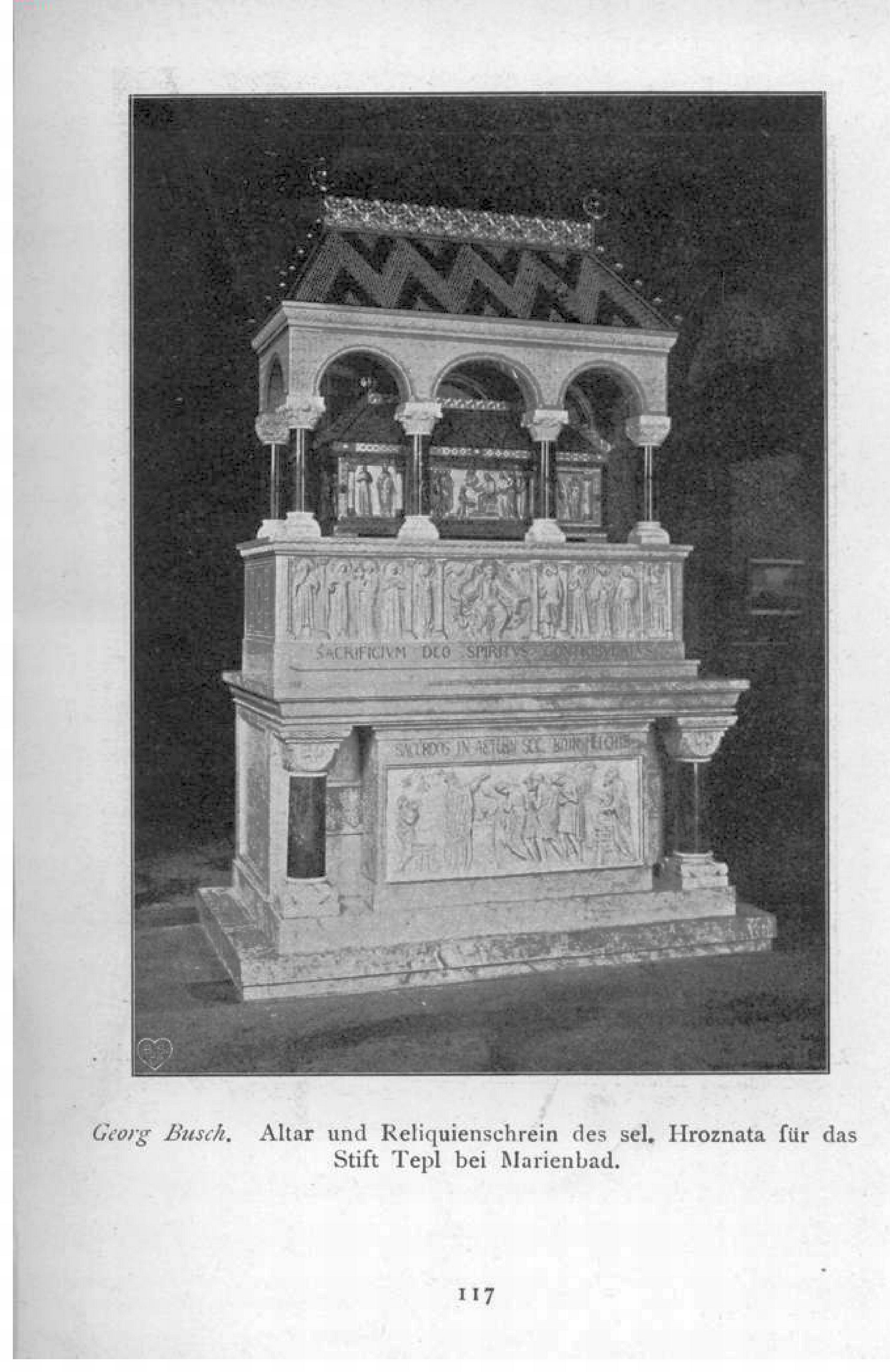 Altar und Reliquienschrein der sel. Hroznata für das Stift Tepl bei Marienbad